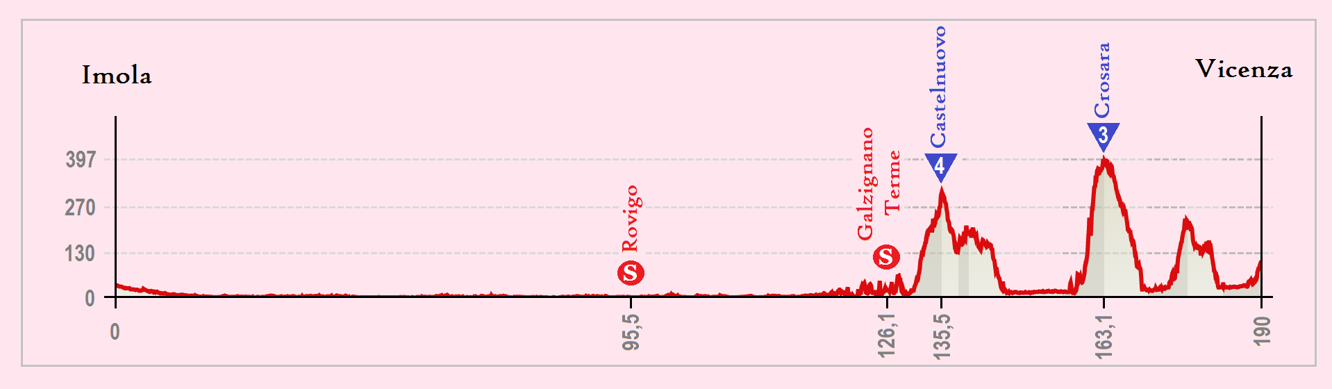 Perfil de la 12.ª etapa del Giro de Italia 2015